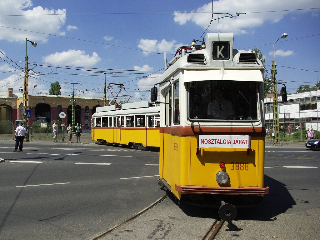 UV villamos a Szépilona kocsiszínnél